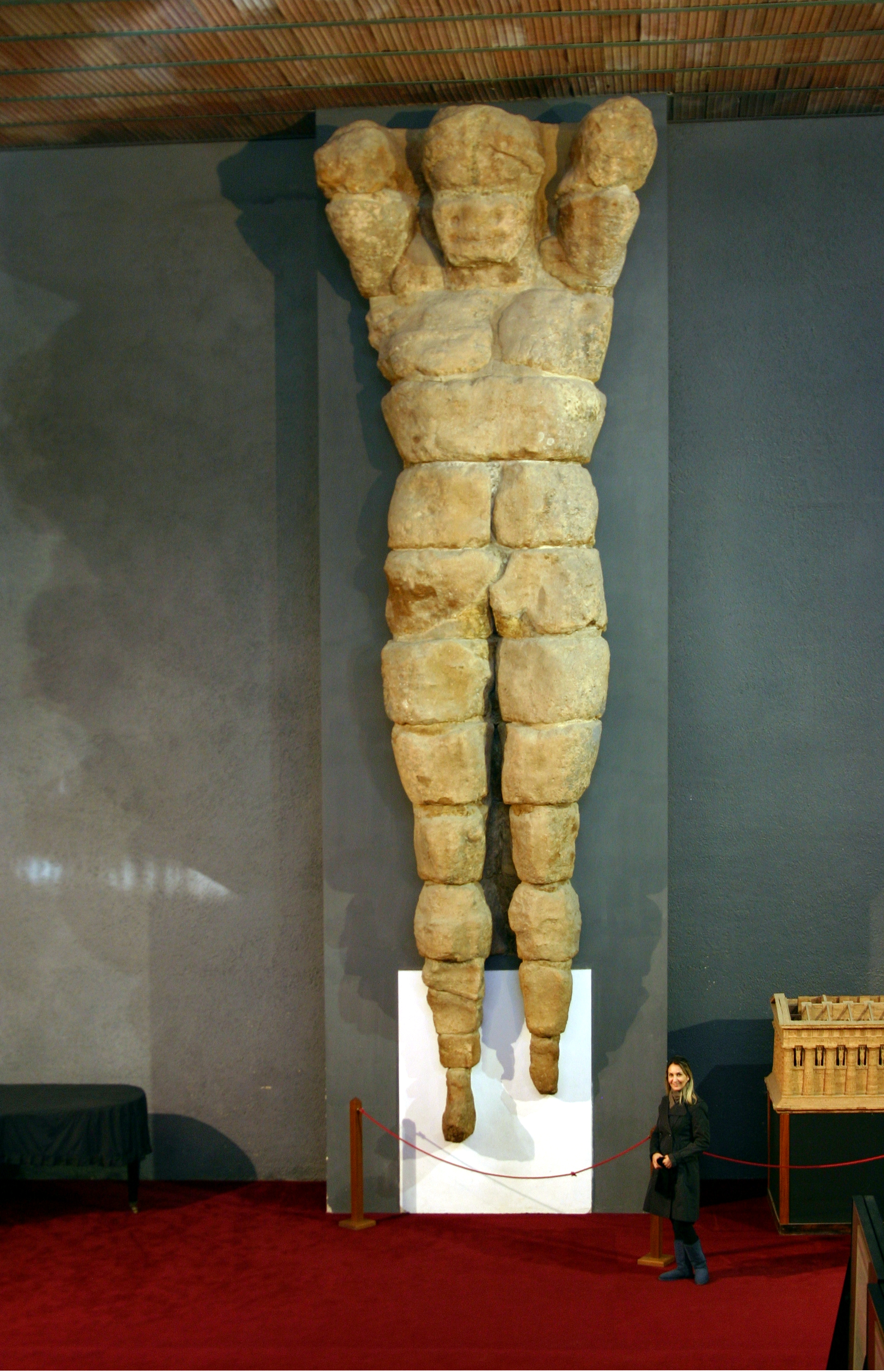 Museo Archeologico Regionale